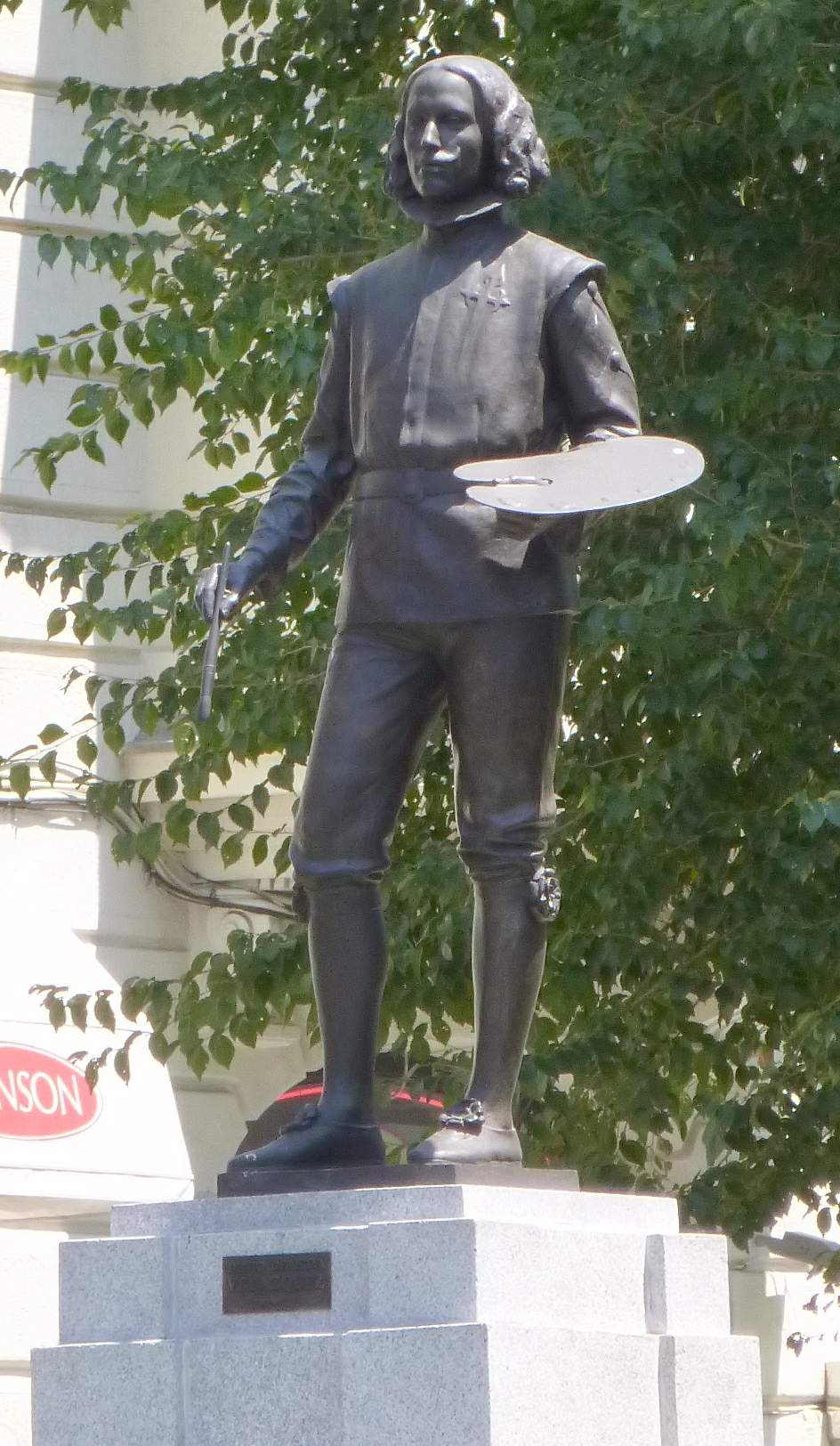 Monumento a Velázquez en la calle homónima de Madrid